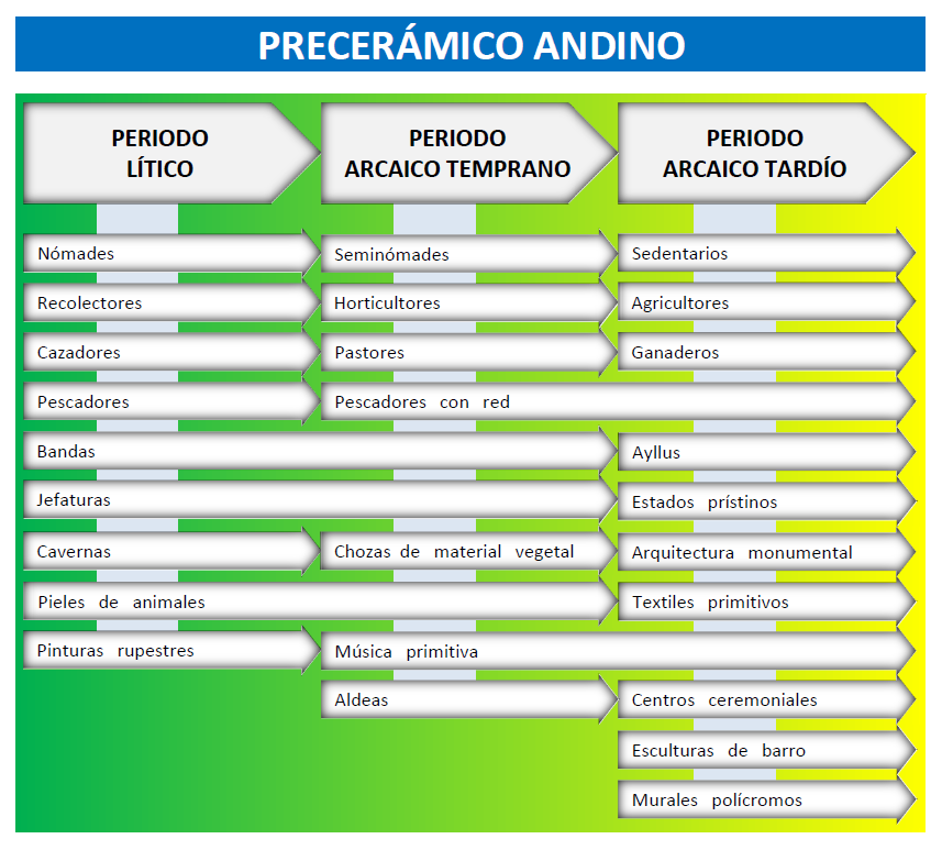 Característica de los períodos Lítico y Arcaico correspondiente al Área Andina Central.